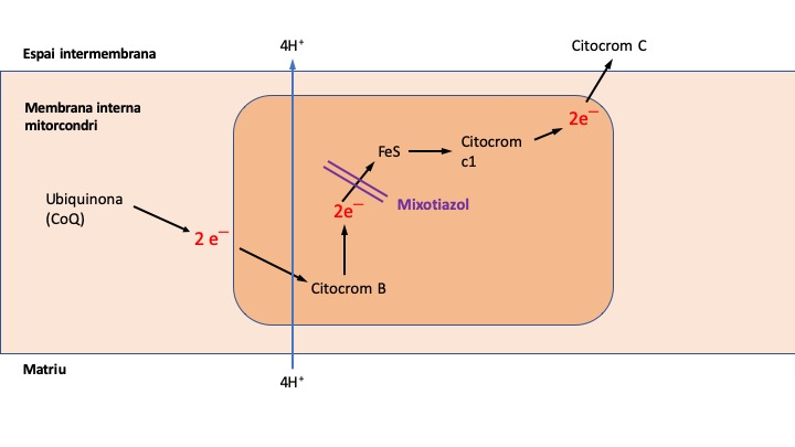 Reacció amb mixotiazol